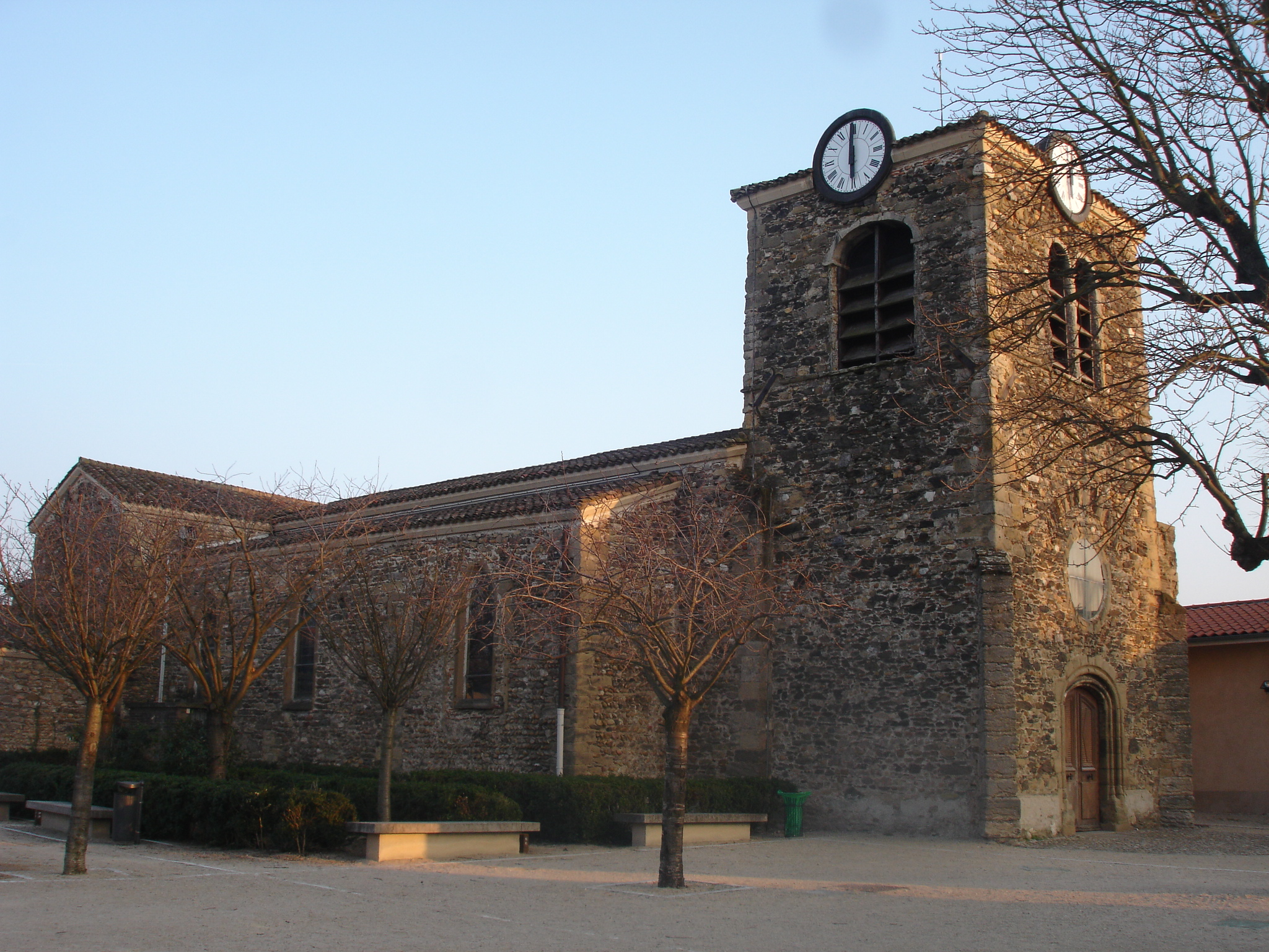 Solaize (69) : l'église vue de profil